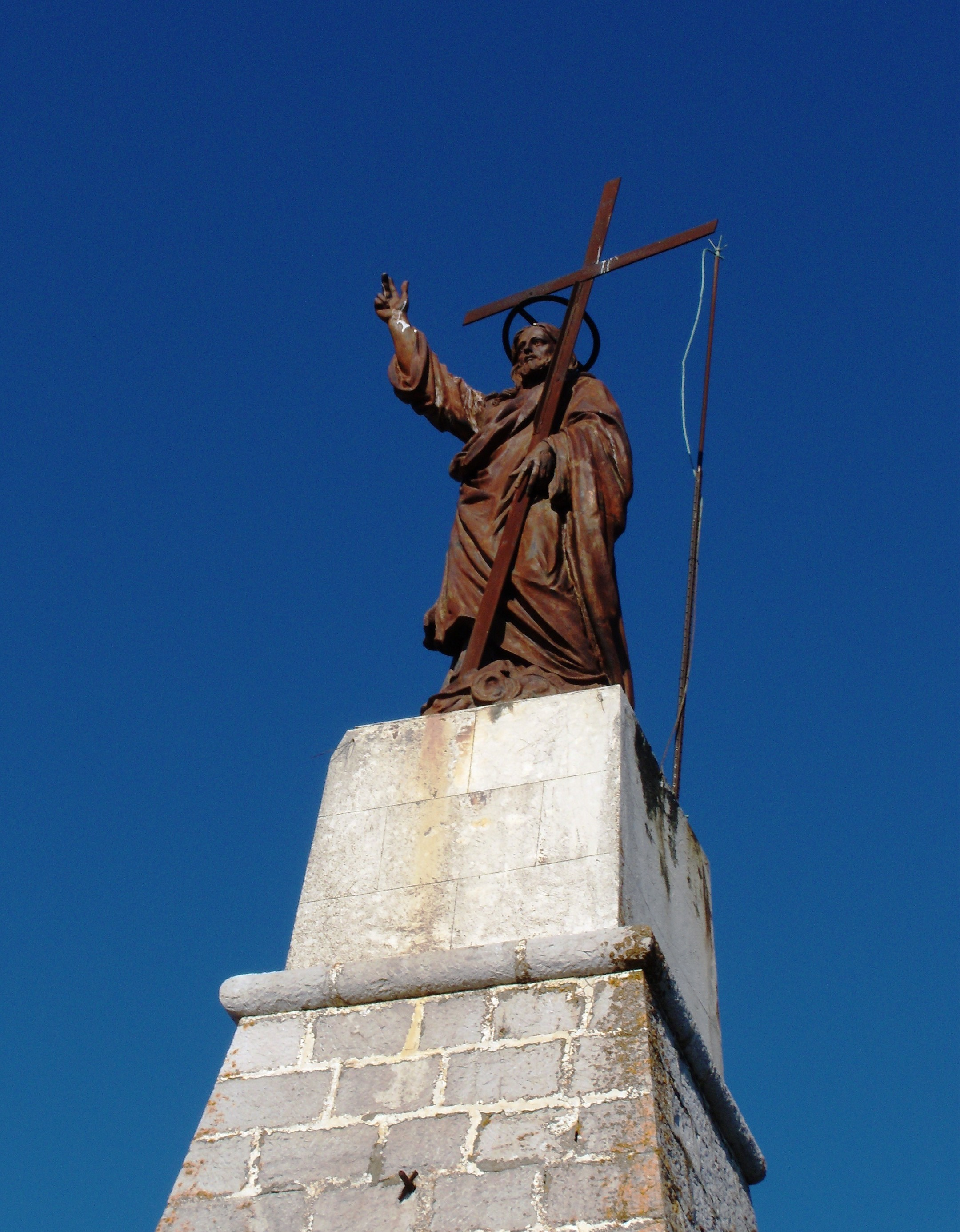 Monumento in ghisa al Gesù Redentore su Monte Acero in Provincia di Benevento.